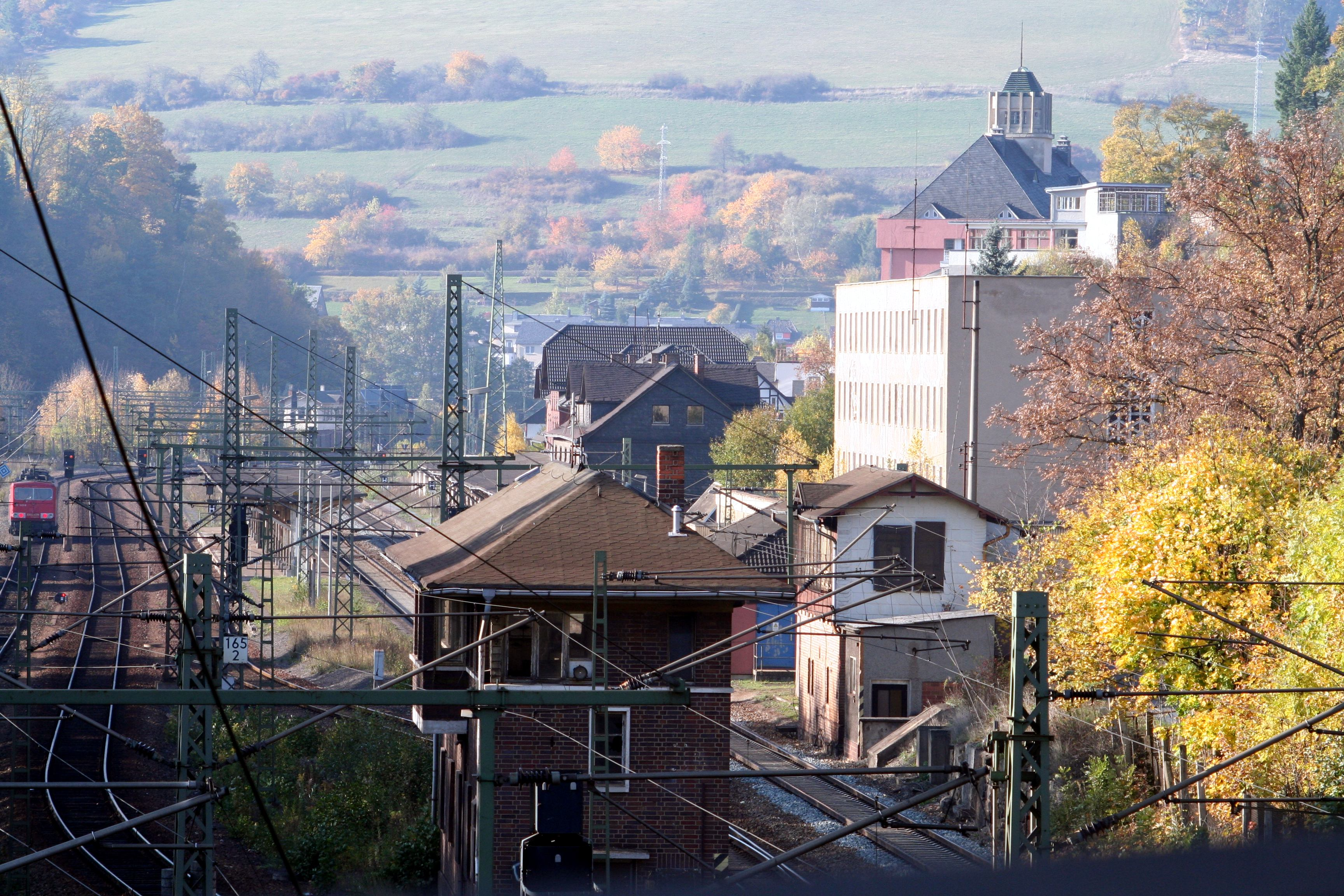 Bahnhof Probstzella in Südthüringen